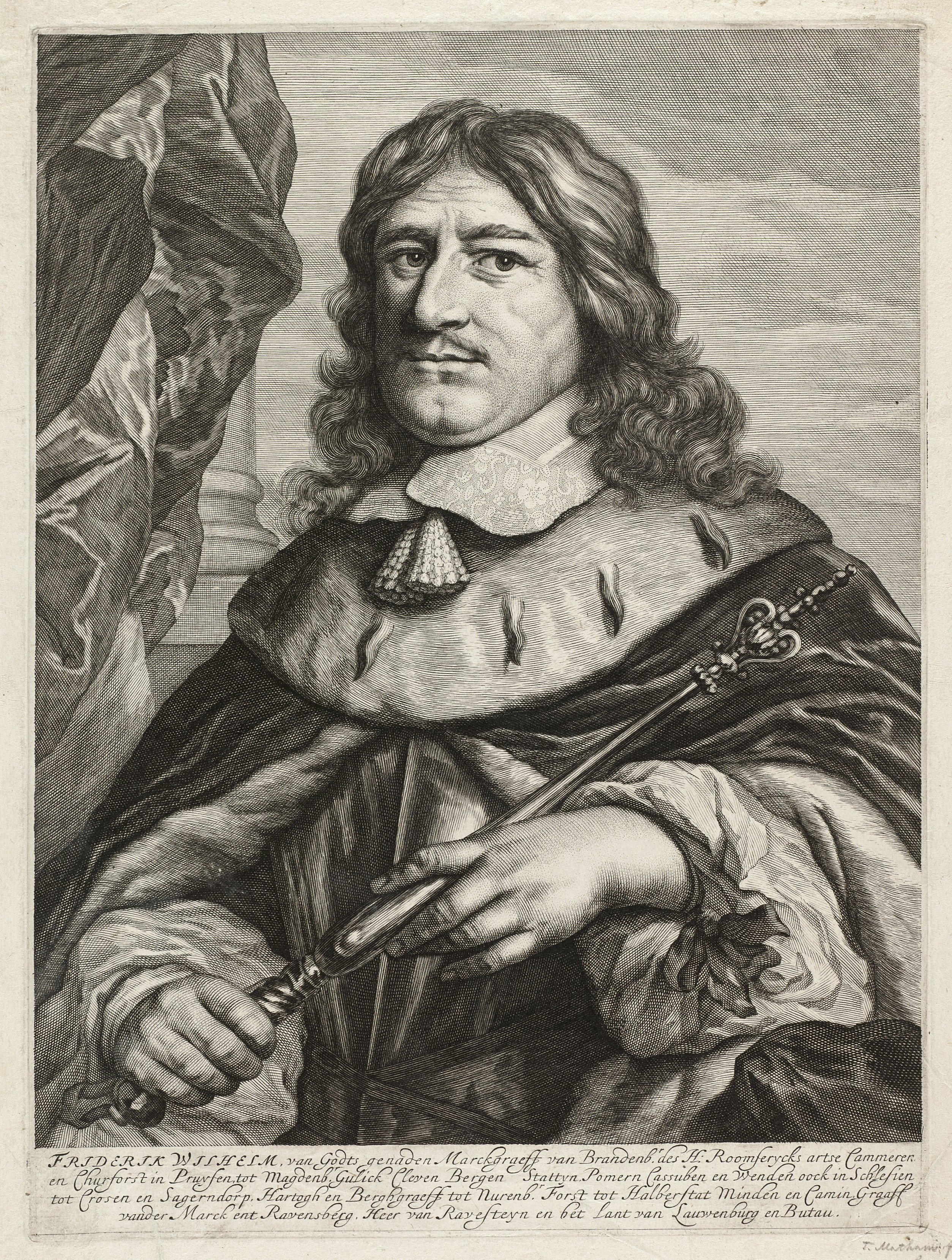 CollectieVoorhelm SchneevoogtInventarisnummerNL-HlmNHA_1477_53009895BeschrijvingPortret van Frederik Willem, keurvorst van Brandenburg met in zijn hand een scepter.Met Nederlands onderschrift.FotonummerNL-HlmNHA_1477_53009895DocumenttypePortrettenVervaardigerMatham, Theodor (1605/1606-1676) Begindatum1620Einddatum1676TechniekGrafiek Drukwerk Afmeting hoogte (cm)28Afmeting breedte (cm)21LiteratuurHollstein Dutch 85